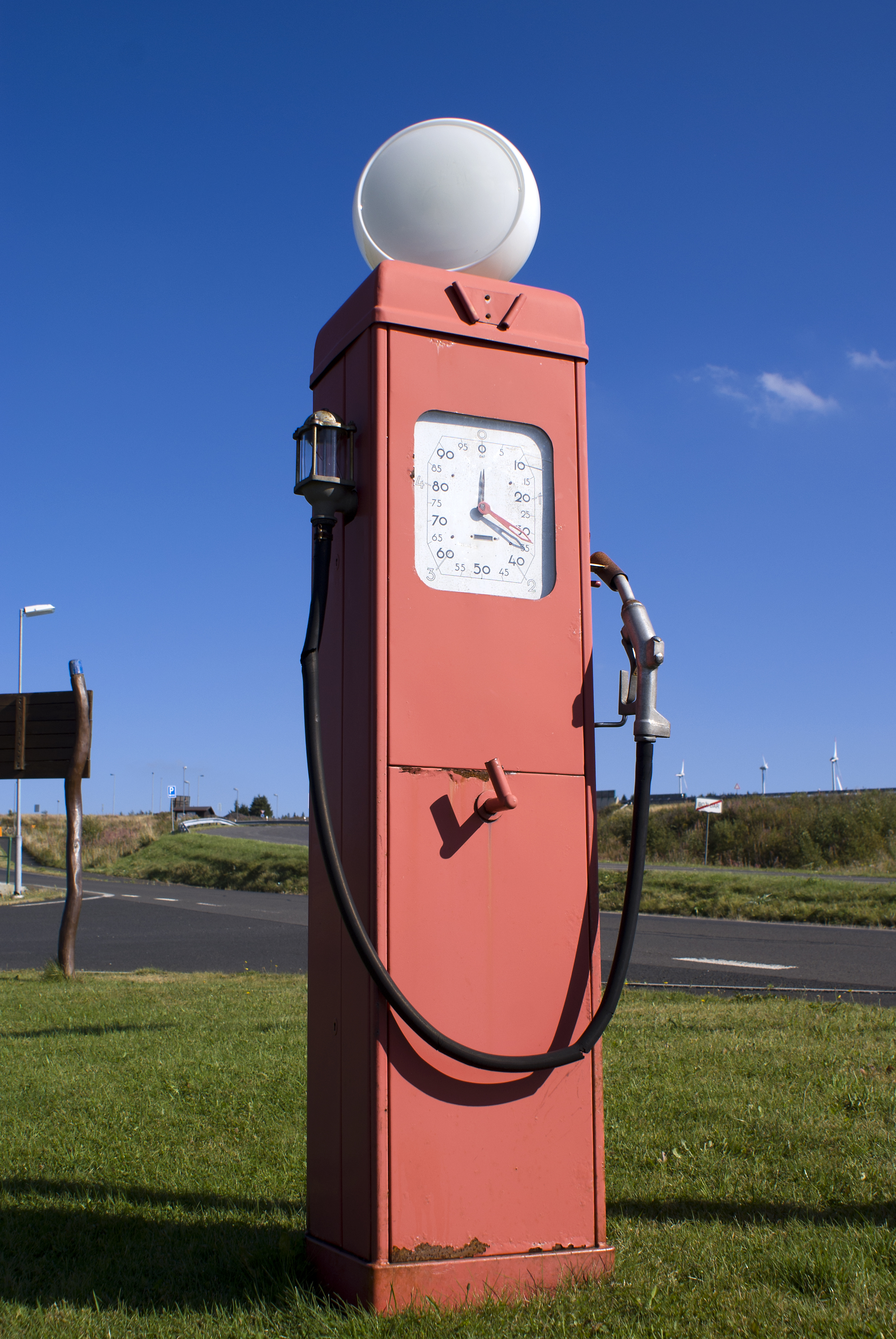 benzínová pumpa - výdejový stojan benzínové čerpací stanice HEFA "C", Boží Dar